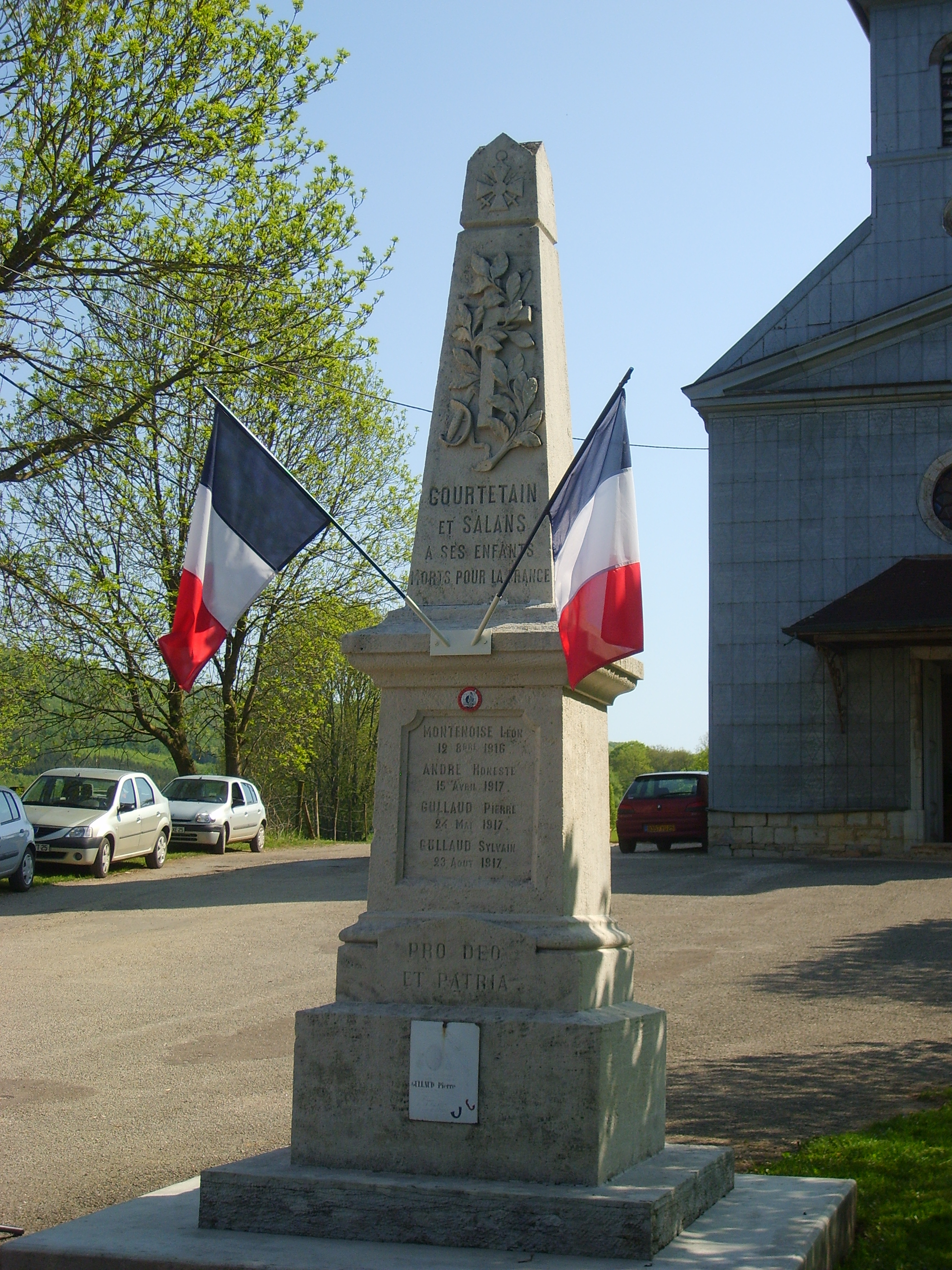 Monument aux morts de Courtetain-et-Salans